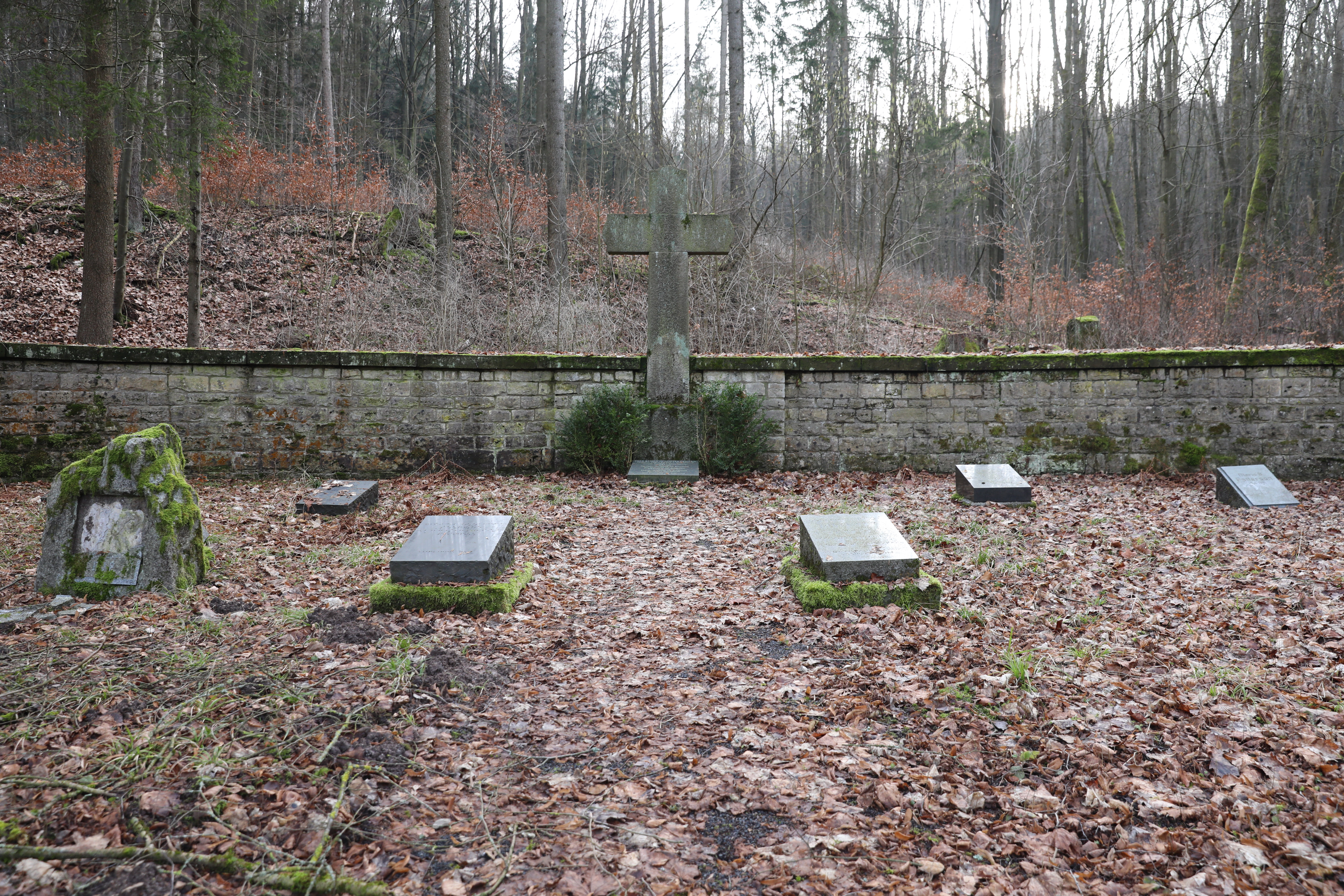 Begräbnisstätte derer von Münchhausen bei Bockstadt